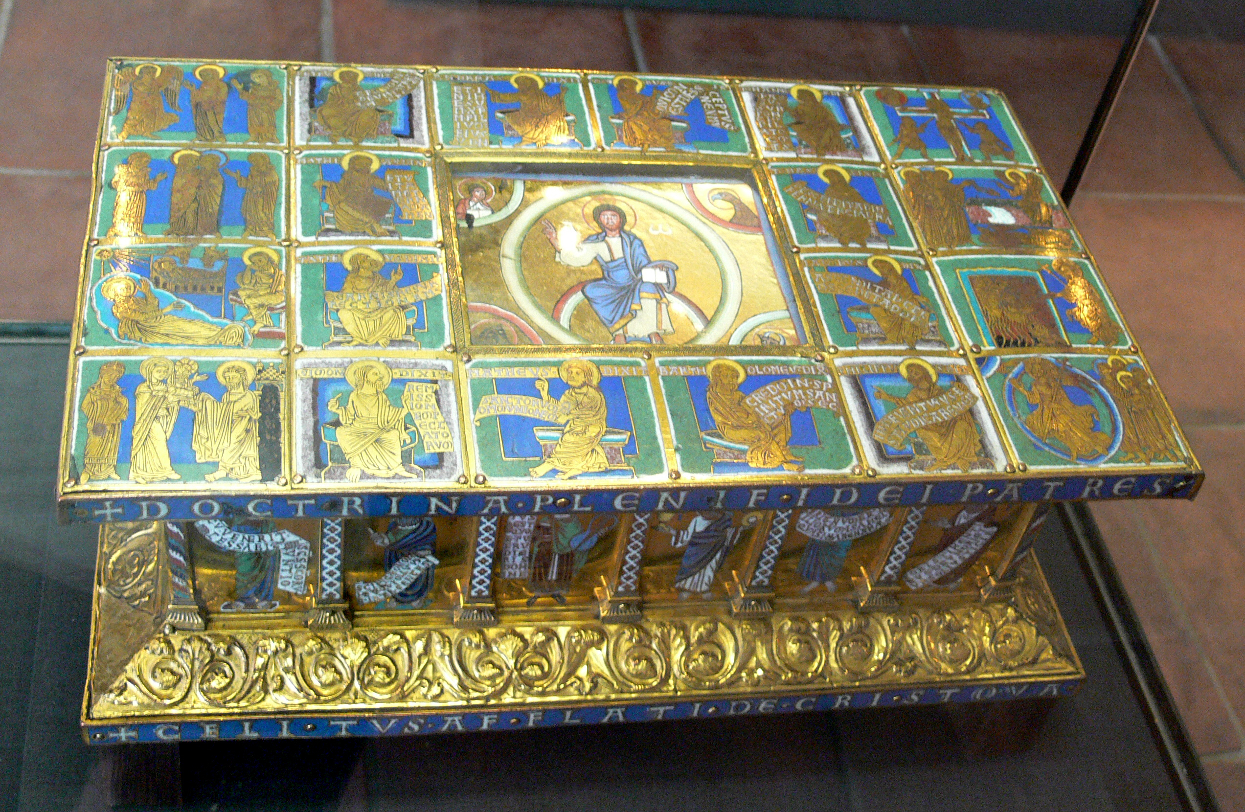 Tragaltar des Eilbertus; Grubenschmelz, Braunfirnis, Bergkristall über Pergamentmalerei; Köln um 1150 Kunstgewerbemuseum Berlin; aus dem Welfenschatz; Inv. Nr. W 11